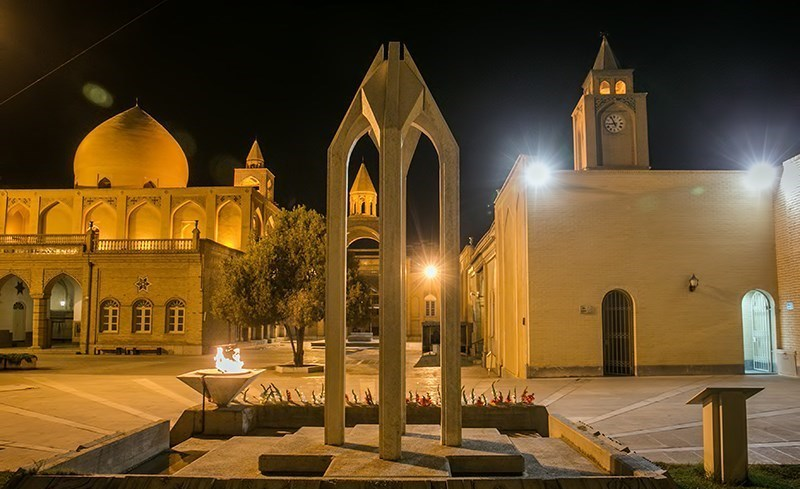 موزه و کلیسای وانک اصفهان